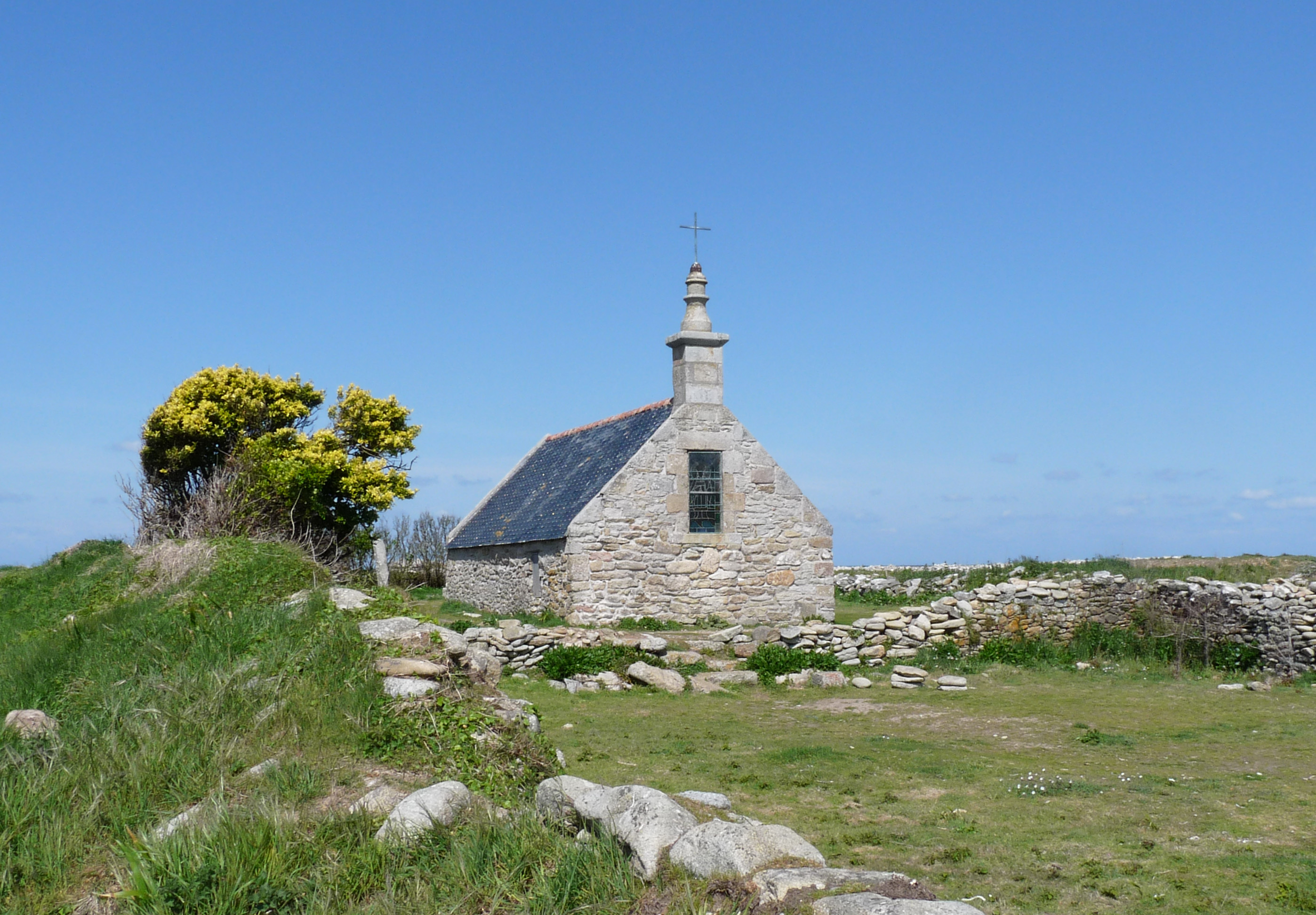 La chapelle Saint-Corentin à l'île de Sein (Finistère, Bretagne)